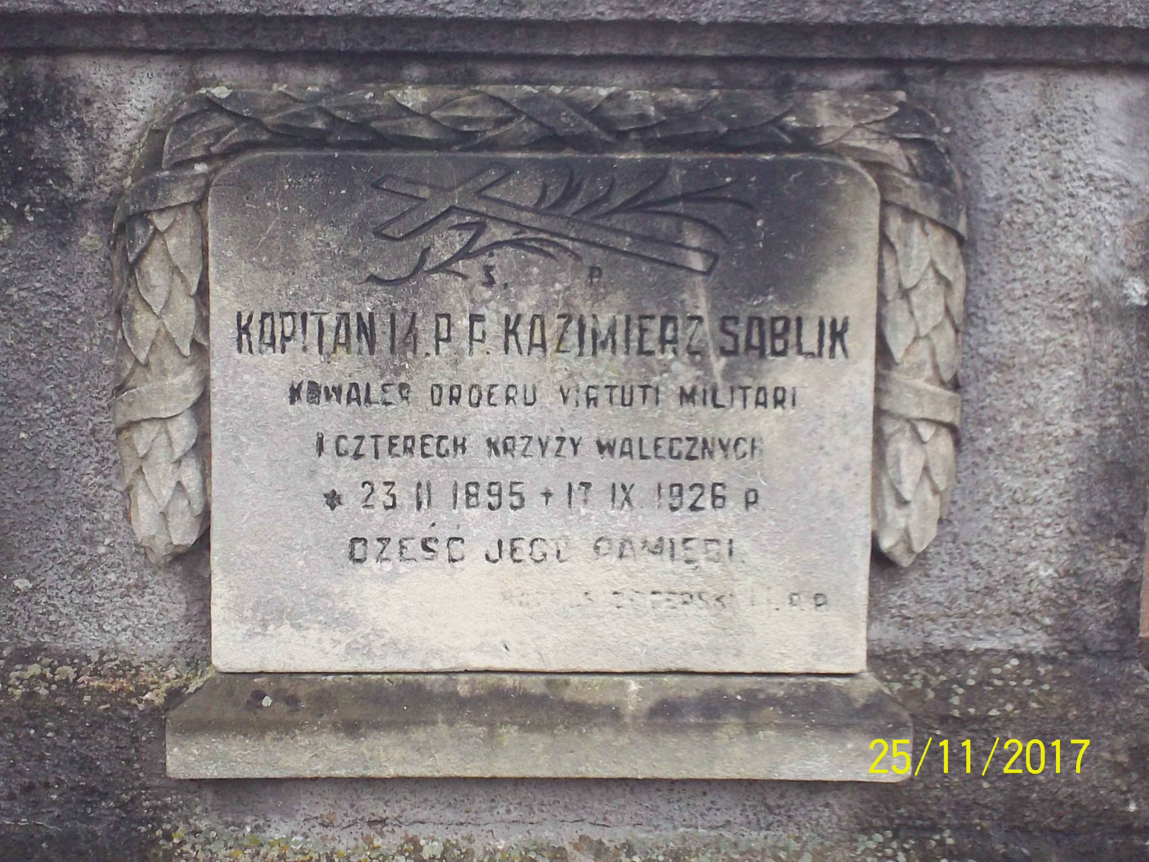 Grób 2